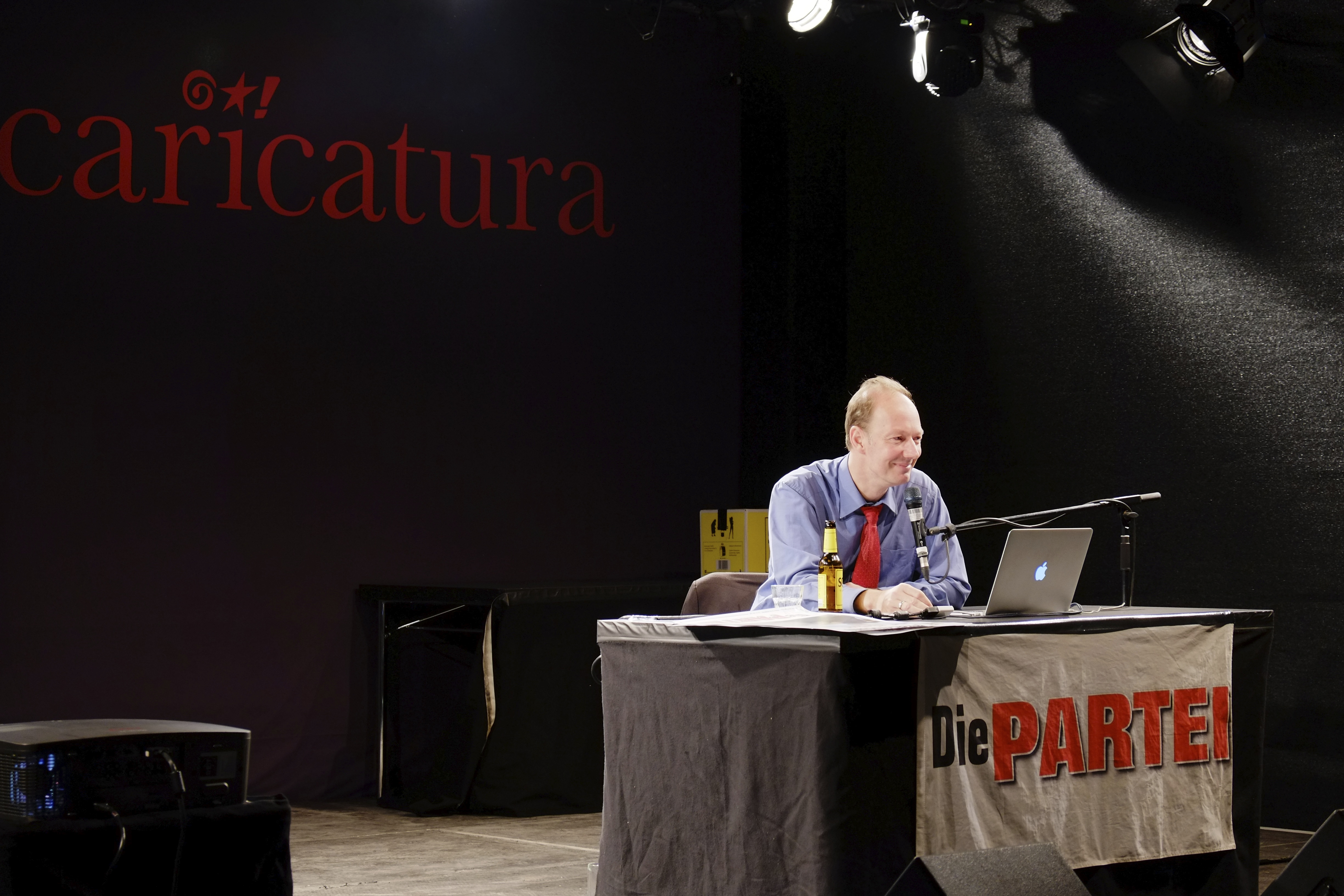 German satirist Martin Sonneborn, Die Partei, European Parliament